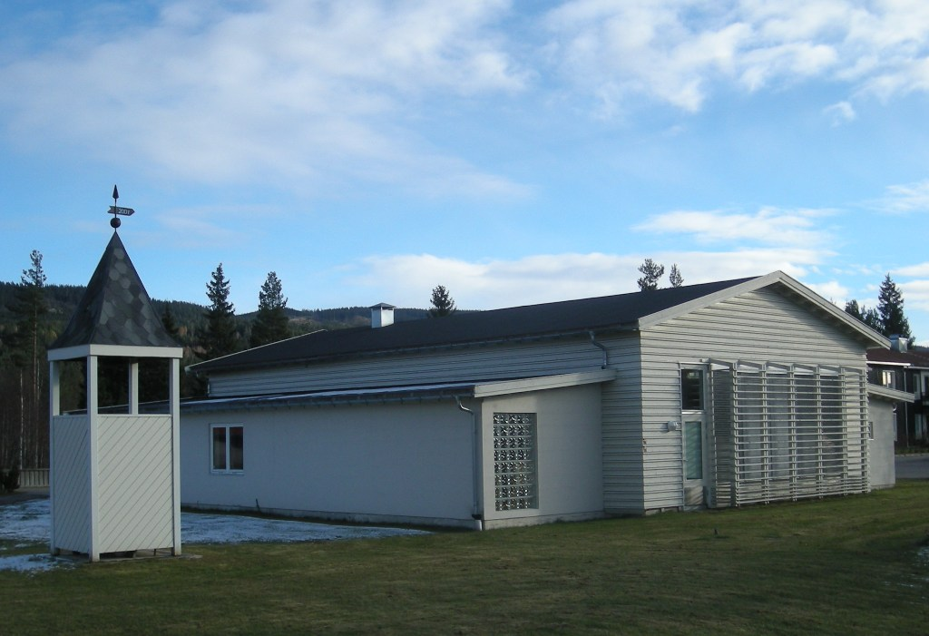 Harestua kapell